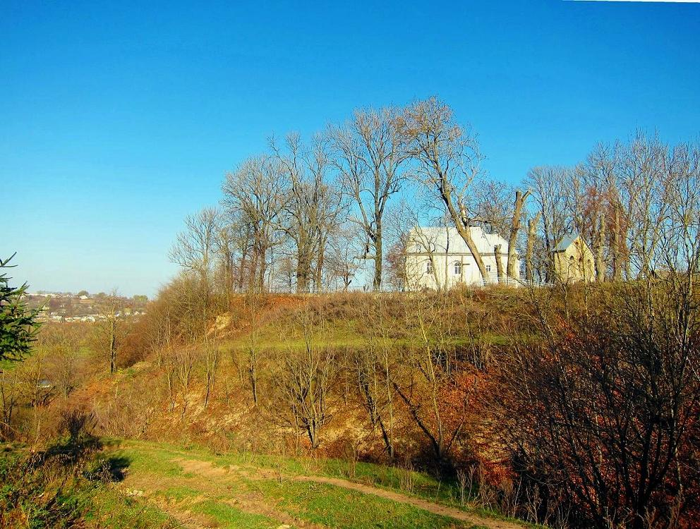 Замковий пагорб в Баворові.